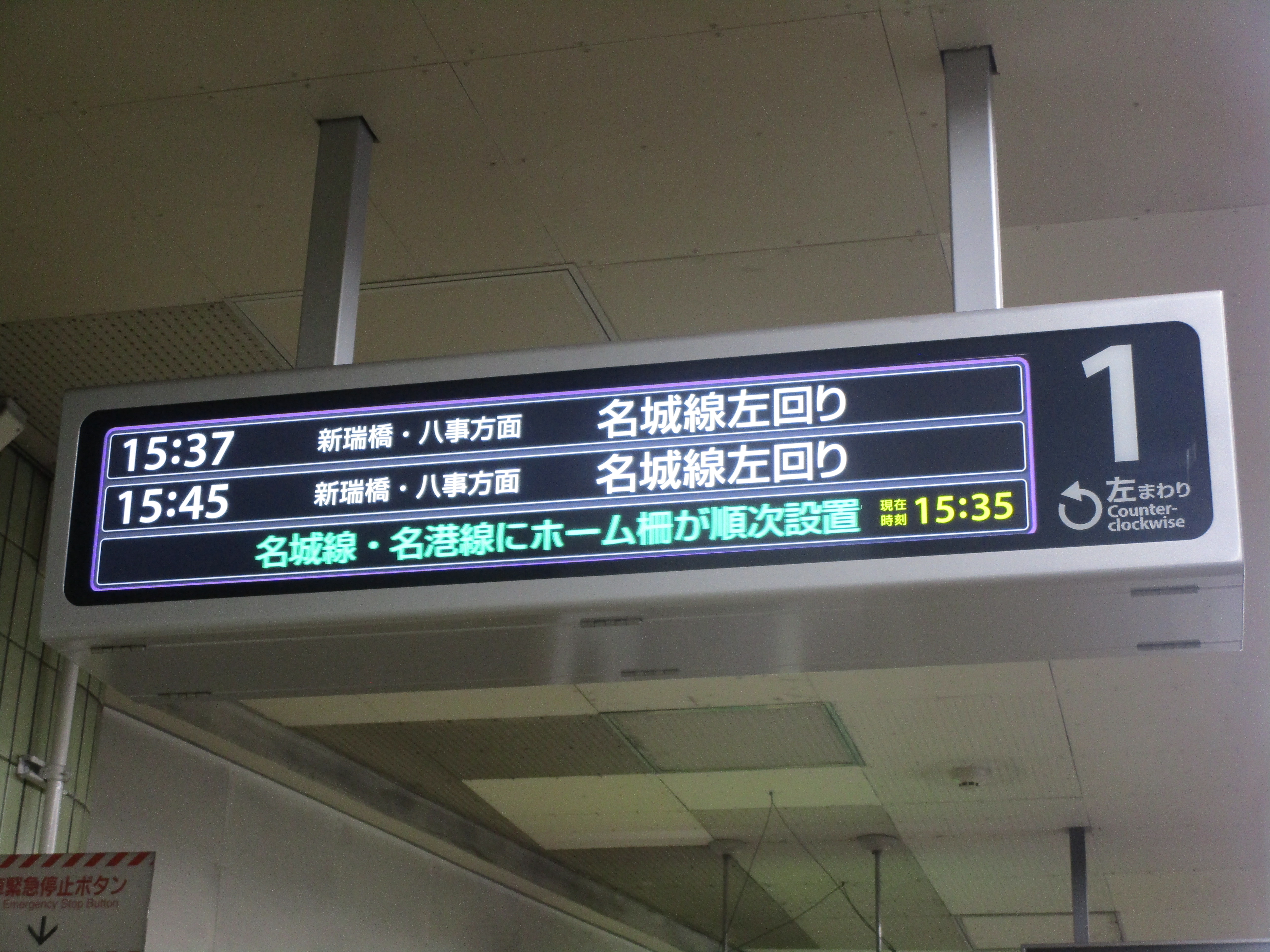 名城線・名港線の新発車標